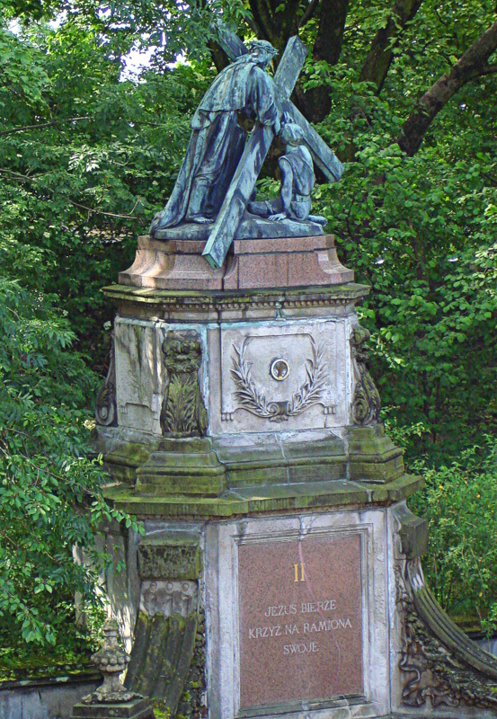 Częstochowa - zespół klasztorny oo. Paulinów: Kościół pw. Wniebowzięcia NMP i Znalezienia Krzyża Św. z kaplicami, zakrystią, skarbcem, wieżą, klasztorem, zabudowaniami gospodarczymi, arsenałem, drukarnią, domem muzykantów, twierdzą z bramami i bastionami, park (zabytek nr A-12/78 z 17.02.1978)